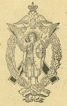 эмблема Союза Михаила Архангела, Union of the Archangel Michael emblem